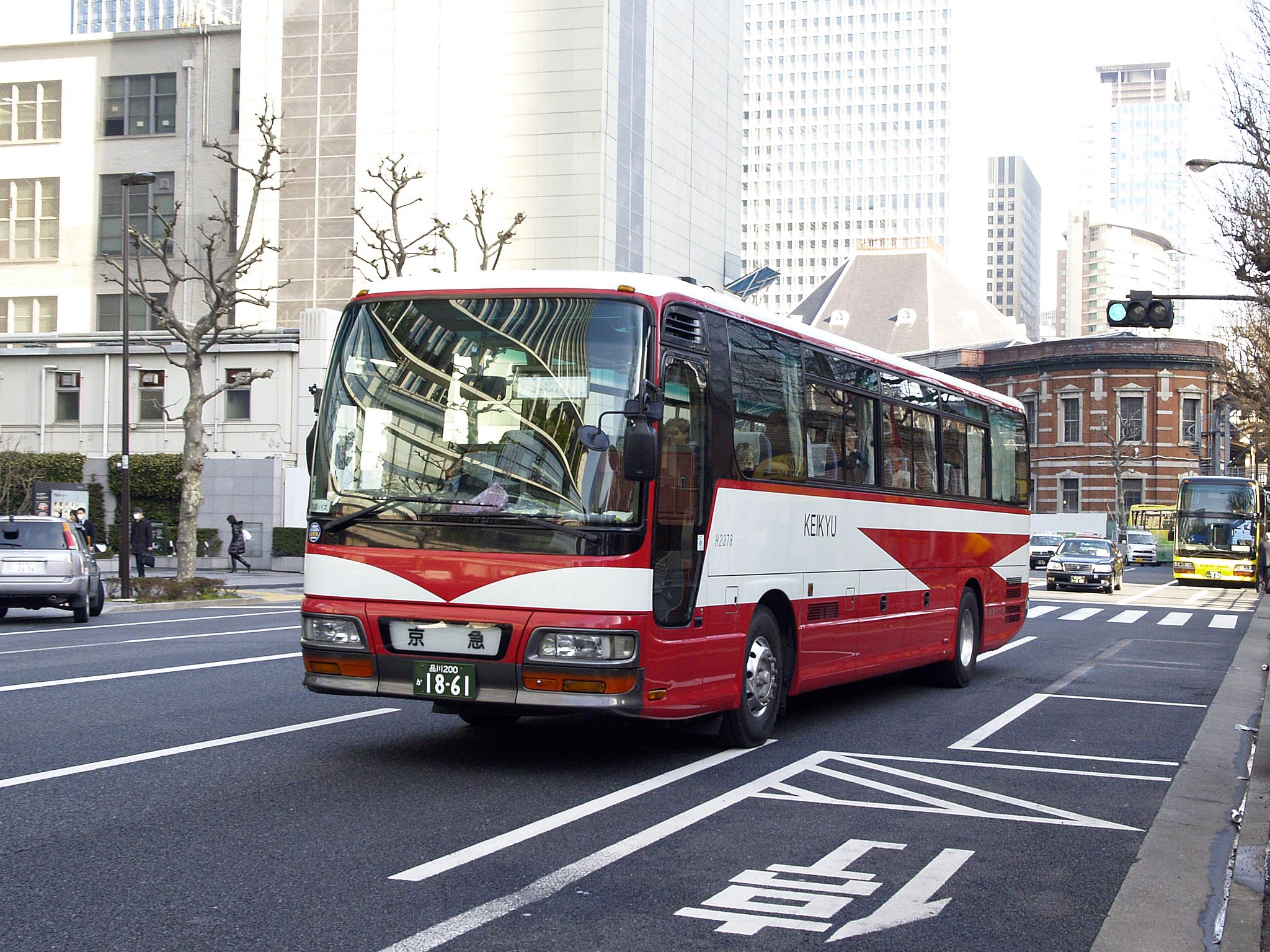 京浜急行バスがはとバスと共同運行する鎌倉・江ノ島への定期観光バス。専用車のH2378号車は京急観光バスのカラーリングを採用する。 型式：いすゞ・ガーラ HD KL-LV781R2 登録番号：品川200か1861 所属：羽田営業所 撮影地：東京都千代田区丸の内